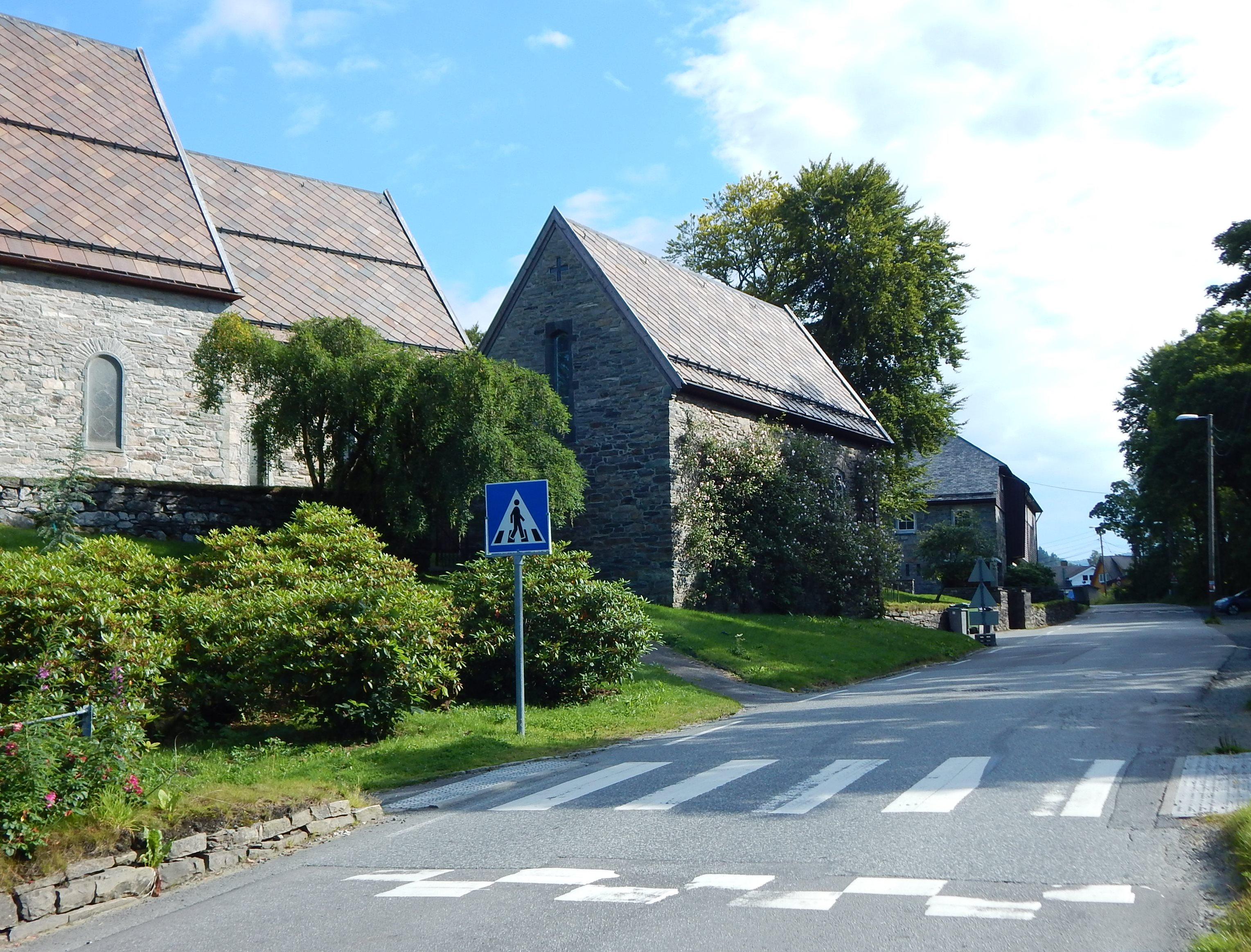 Titlestadvegen (fylkesvei 169) forbi Fana kirke